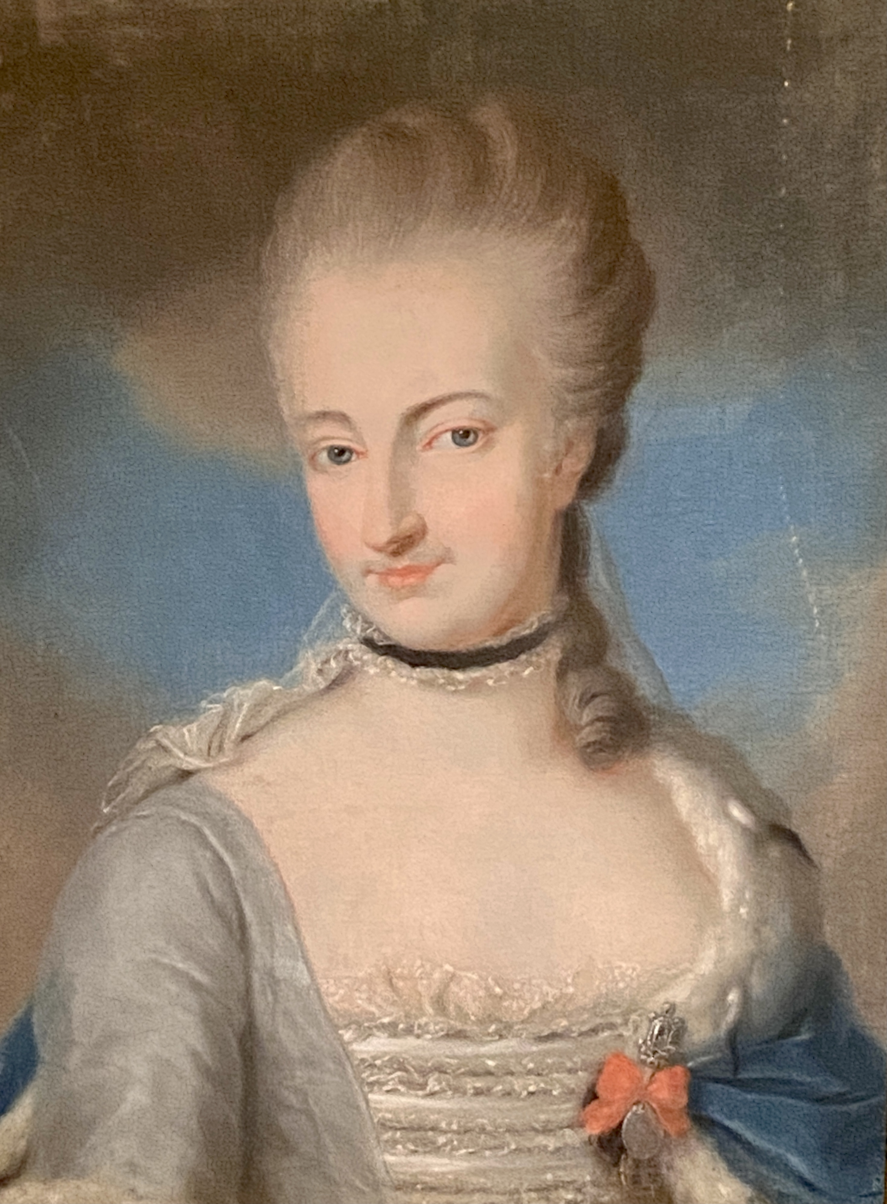 Portret Teofili Strzeżysławy z Jabłonowskich Sapieżyny